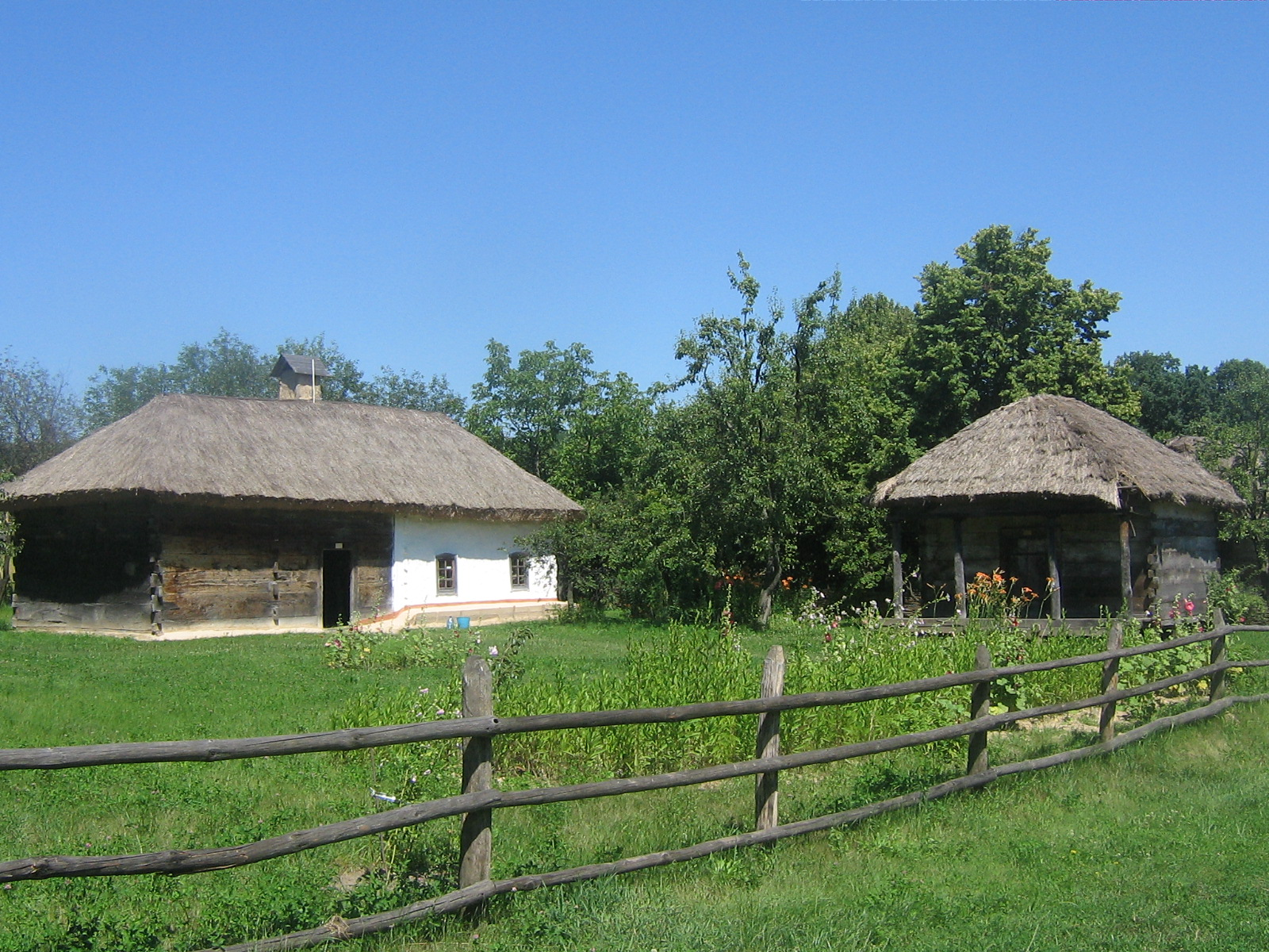 Національний музей народної архітектури і побуту України (с. Пирогів), Київ, Червонопрапорна вул., с. Пирогів